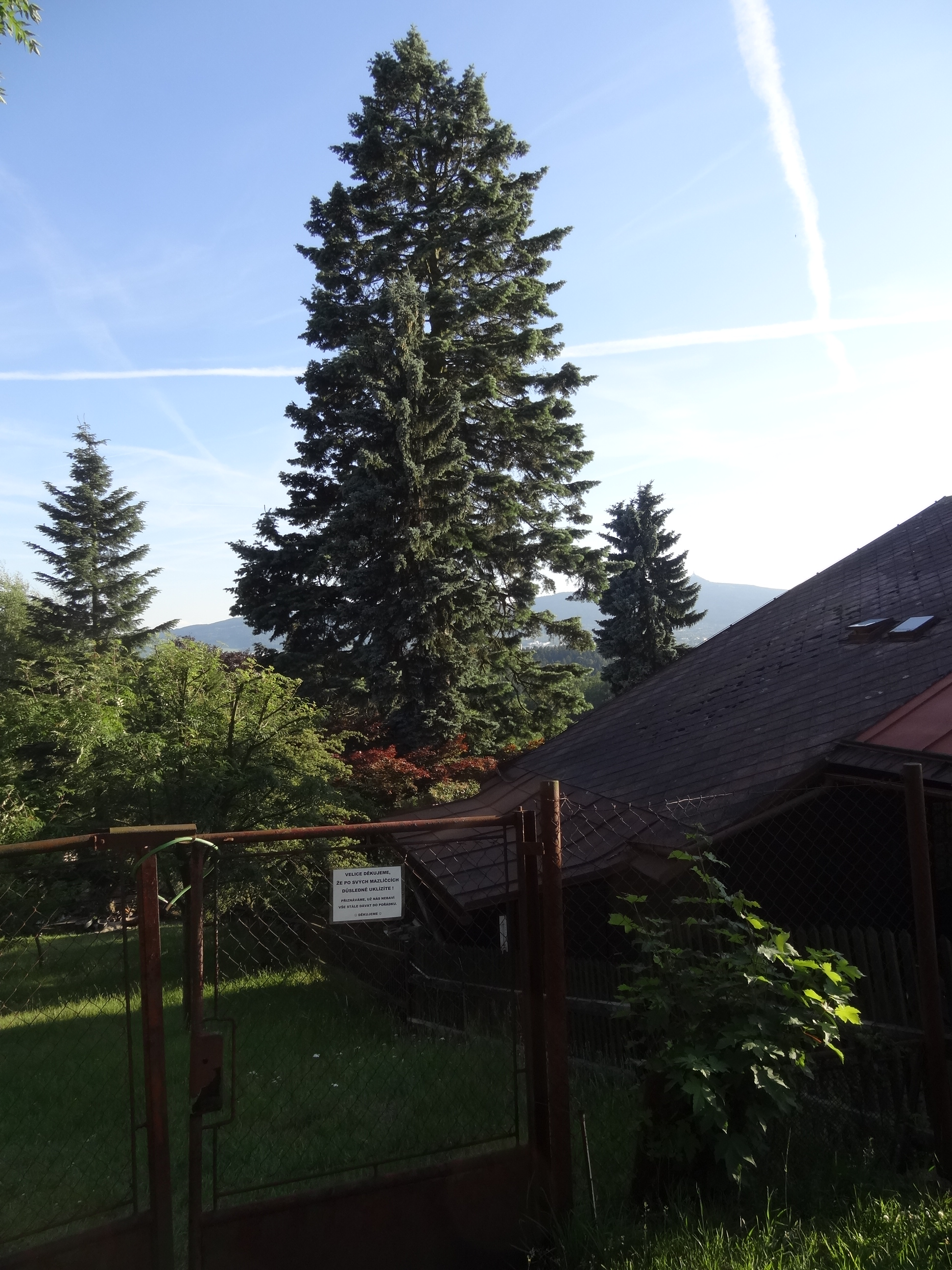 Starý Harcov (Liberec XV) - památná jedle ojíněná u Jirásků